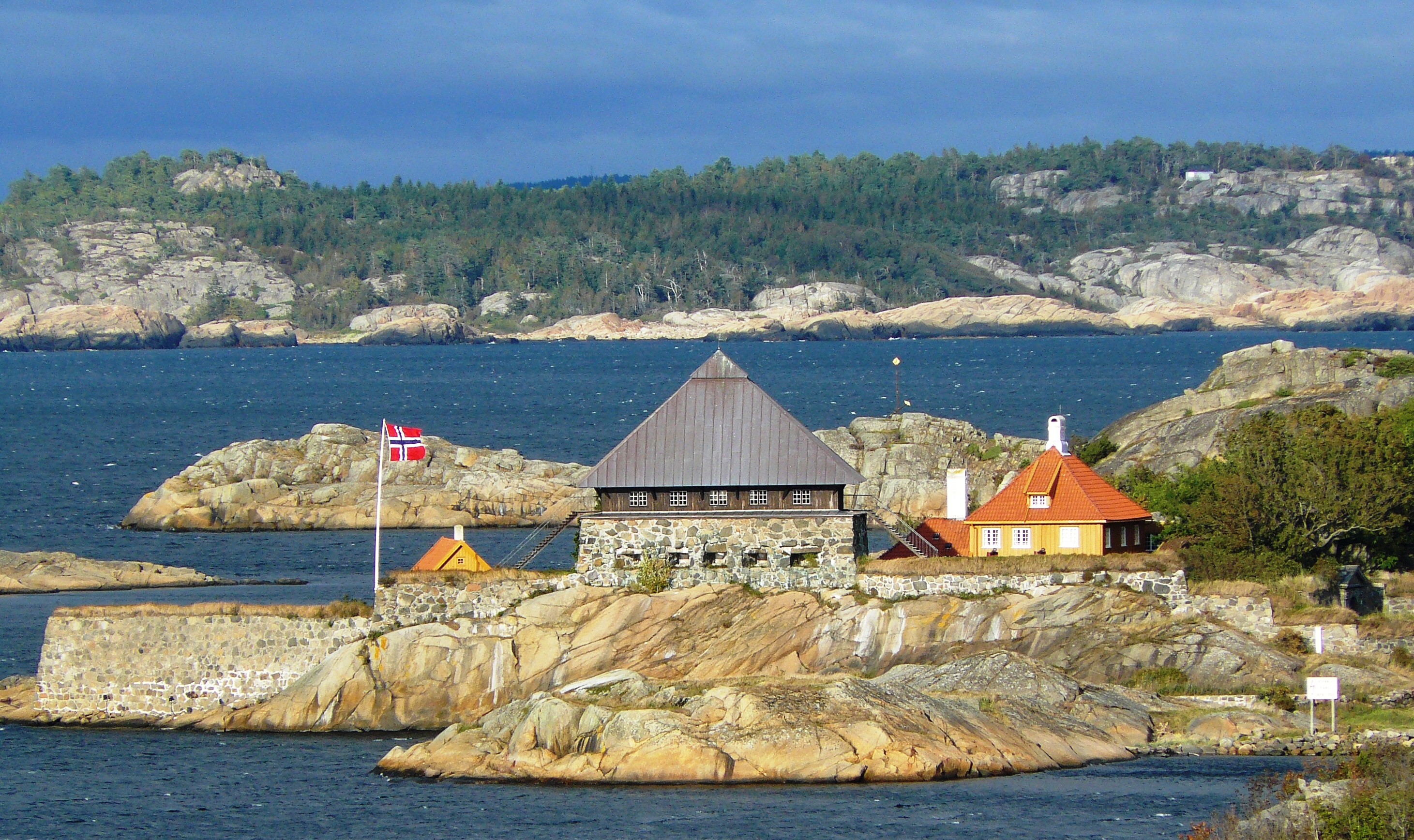 Citadellet, Stavern